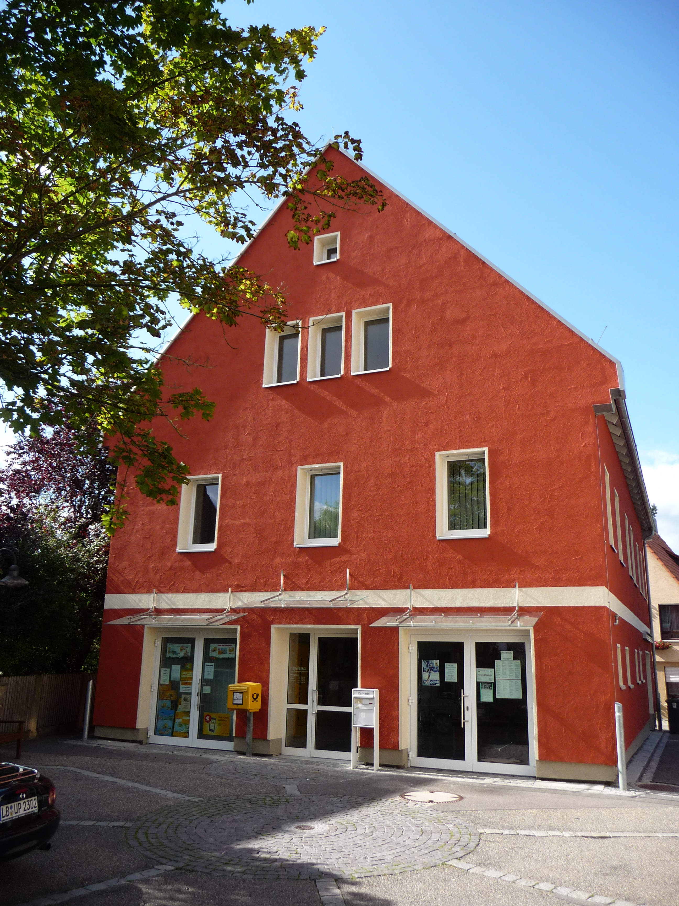 Bürgerhaus, ehemaliges Rathaus